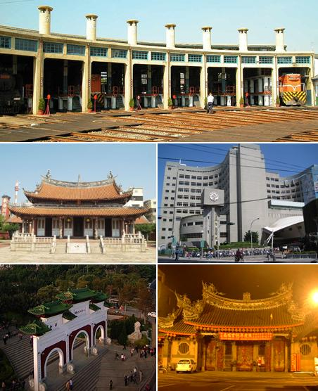 臺灣彰化市的蒙太奇。由上順時針依序：彰化扇形車庫、彰化基督教醫院總院、南瑤宮夜景、八卦山風景區、彰化孔廟